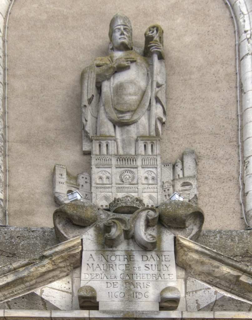 Eglise de Sully sur loire - Maurice de Sully avec à ses pieds Notre dame de Paris